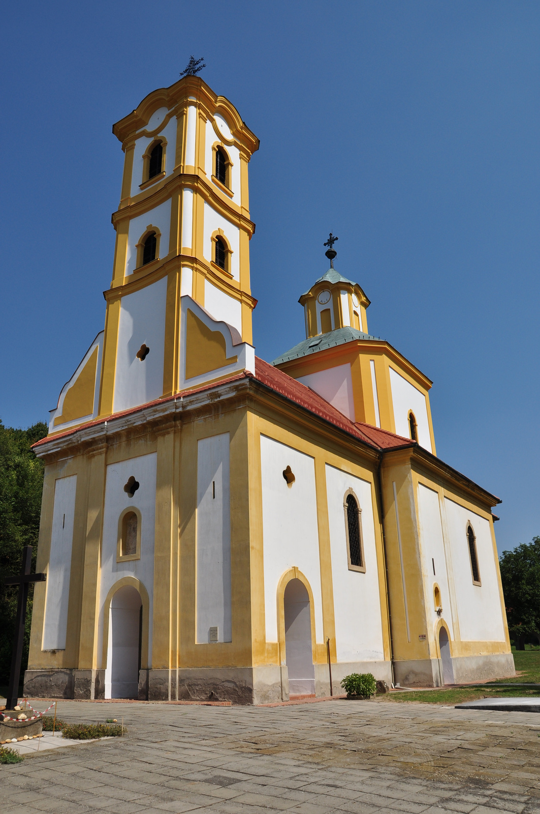 Gör. kel. szerb templom (Szent Mihály és Gábor arkangyalok) (Grábóc, Zrínyi Miklós utca 49.)